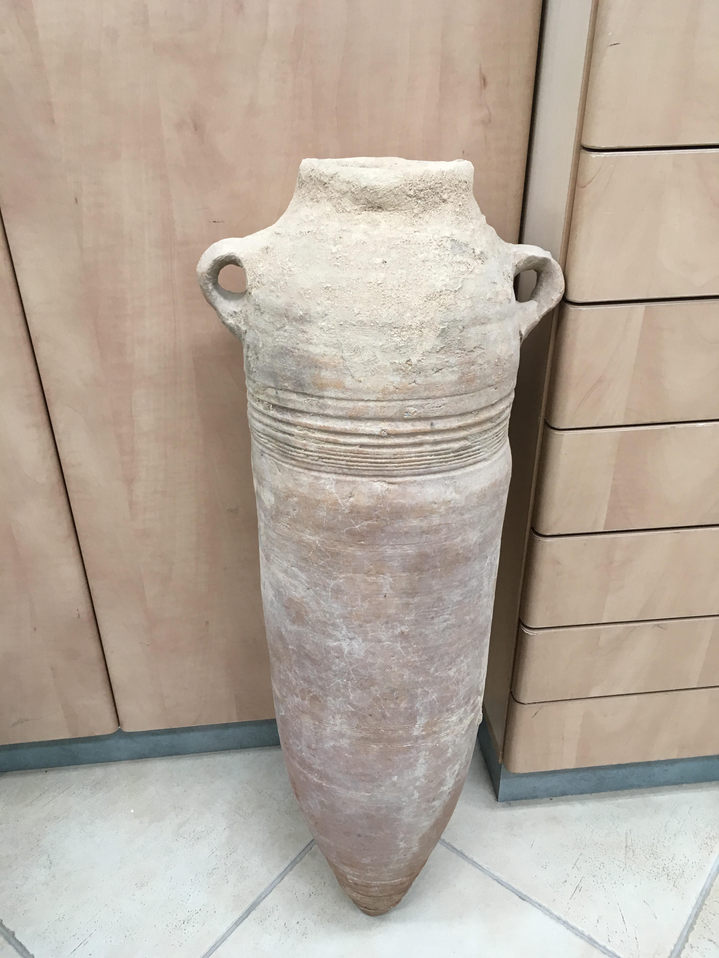 קנקן עזה (טיפוס 4) מאוסף החוג לארכיאולוגיה, אוניברסיטת חיפה.